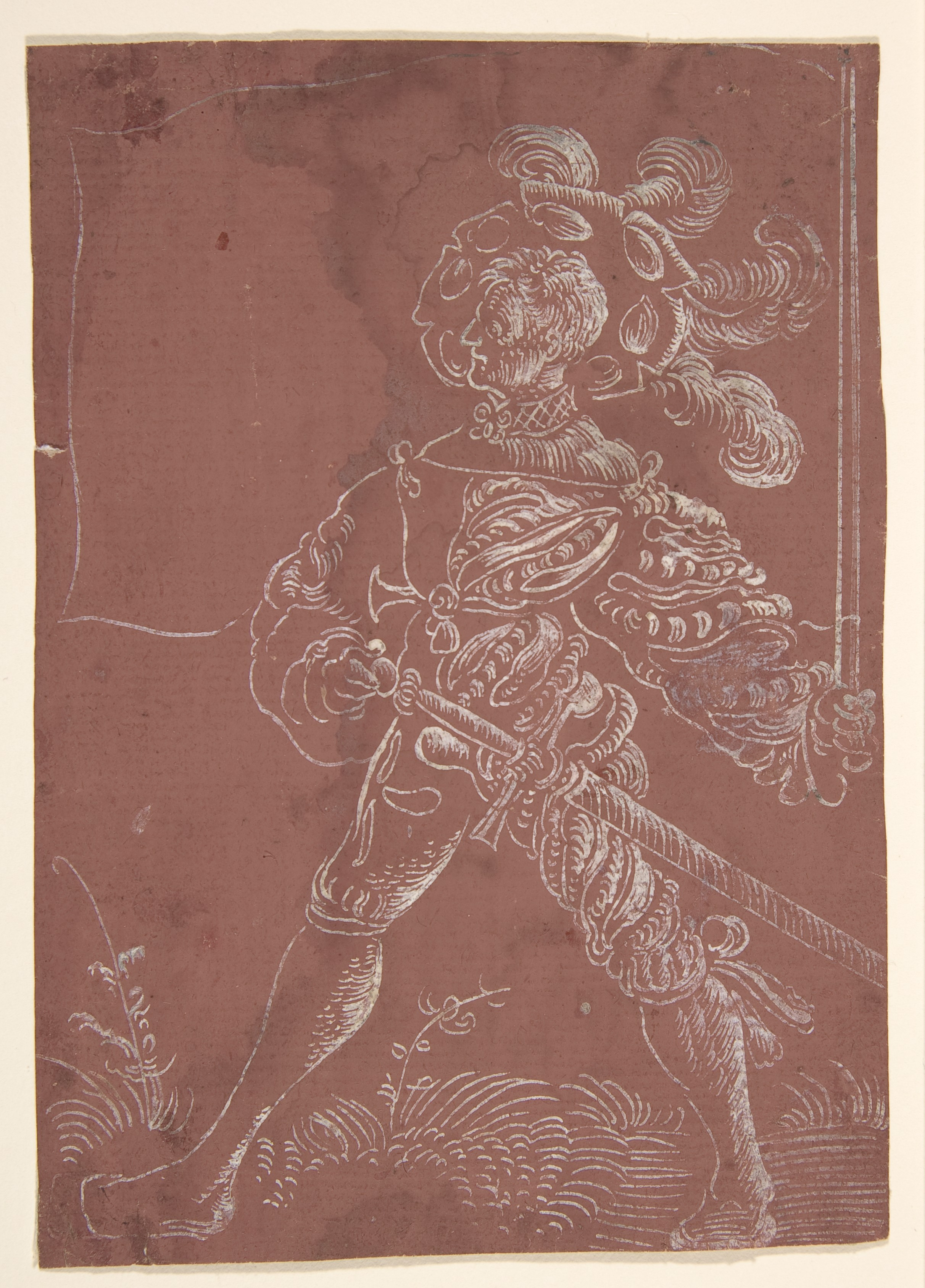 Drawing; Drawings